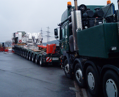 Zusammenstellen eines Schwertransports (Transformator eines Energieversorgers)